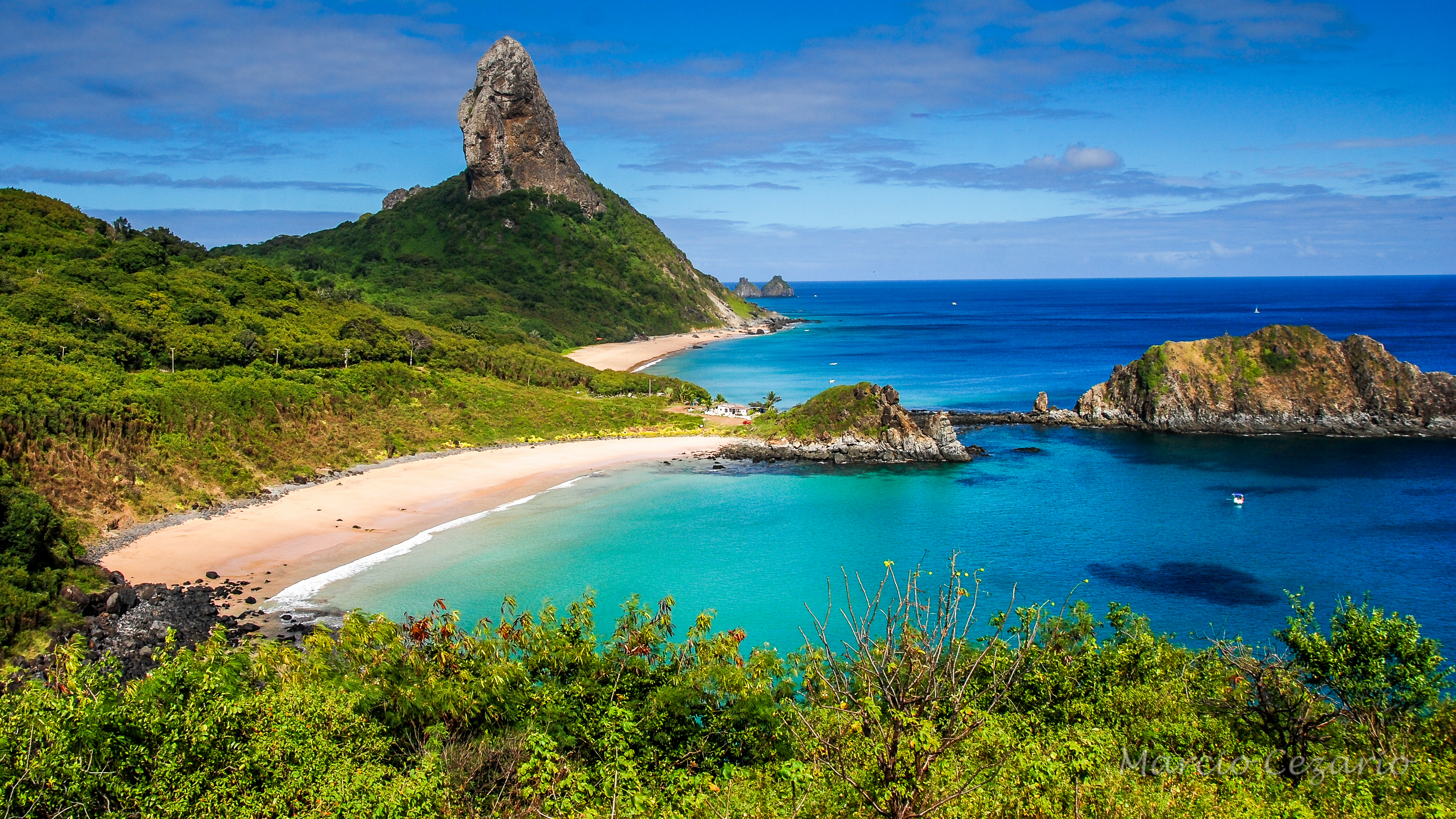 Forte Nossa Senhora dos Remédios